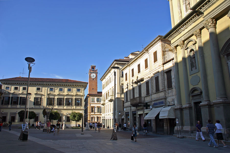 Piazza Gramsci a Novara. Sullo sfondo la torre dell'orologio di Palazzo Natta. A destra la Chiesa di San Pietro al Rosario.